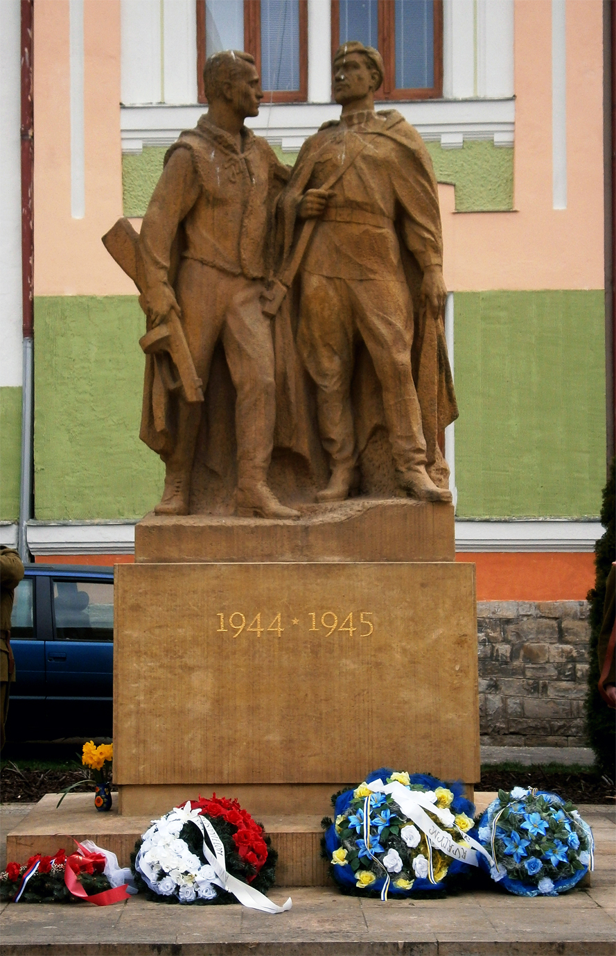 Pieskovcová plastika Zbratanie od akademického sochára Štefana Belohradského na Myjave